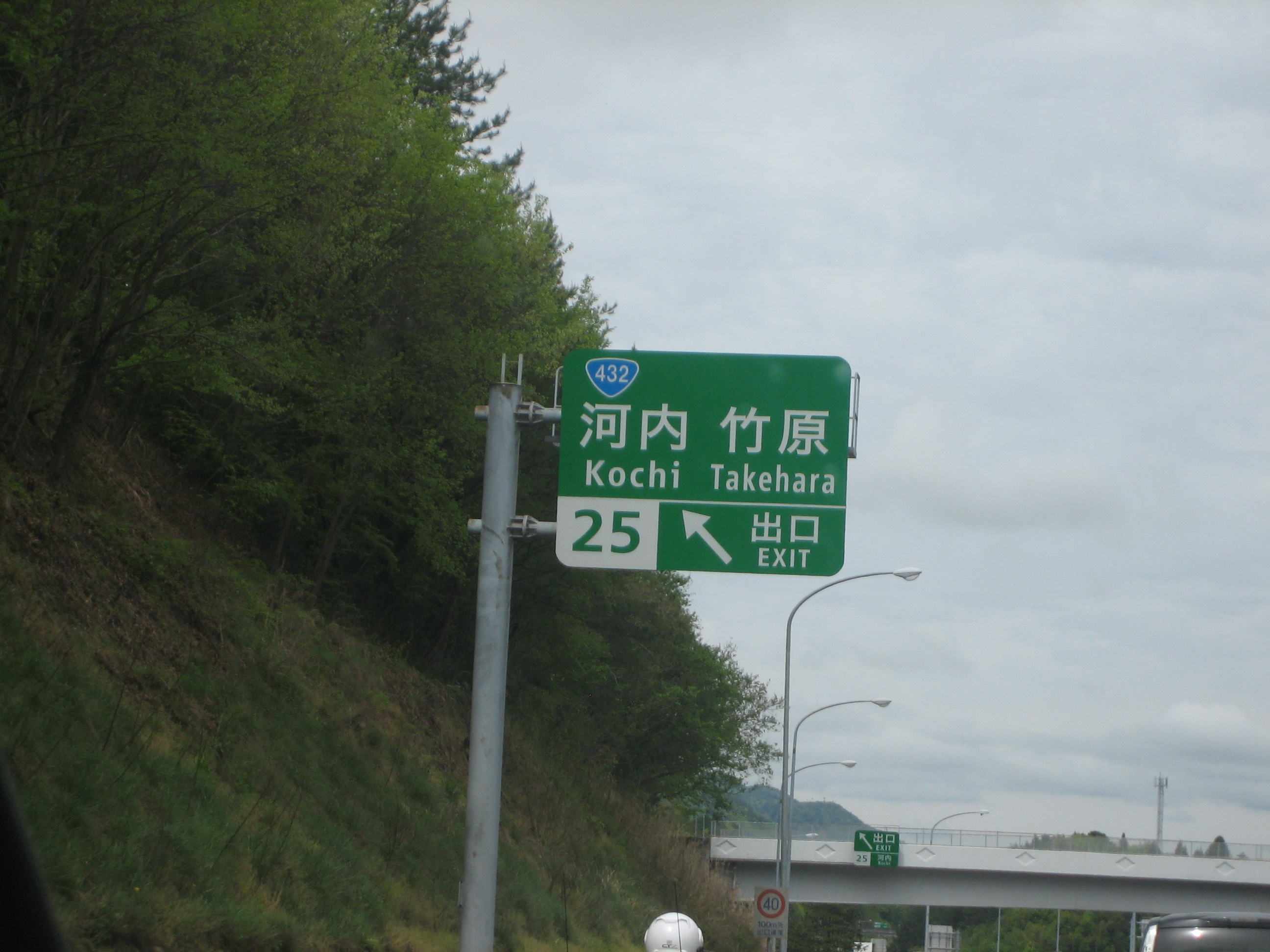 河内IC